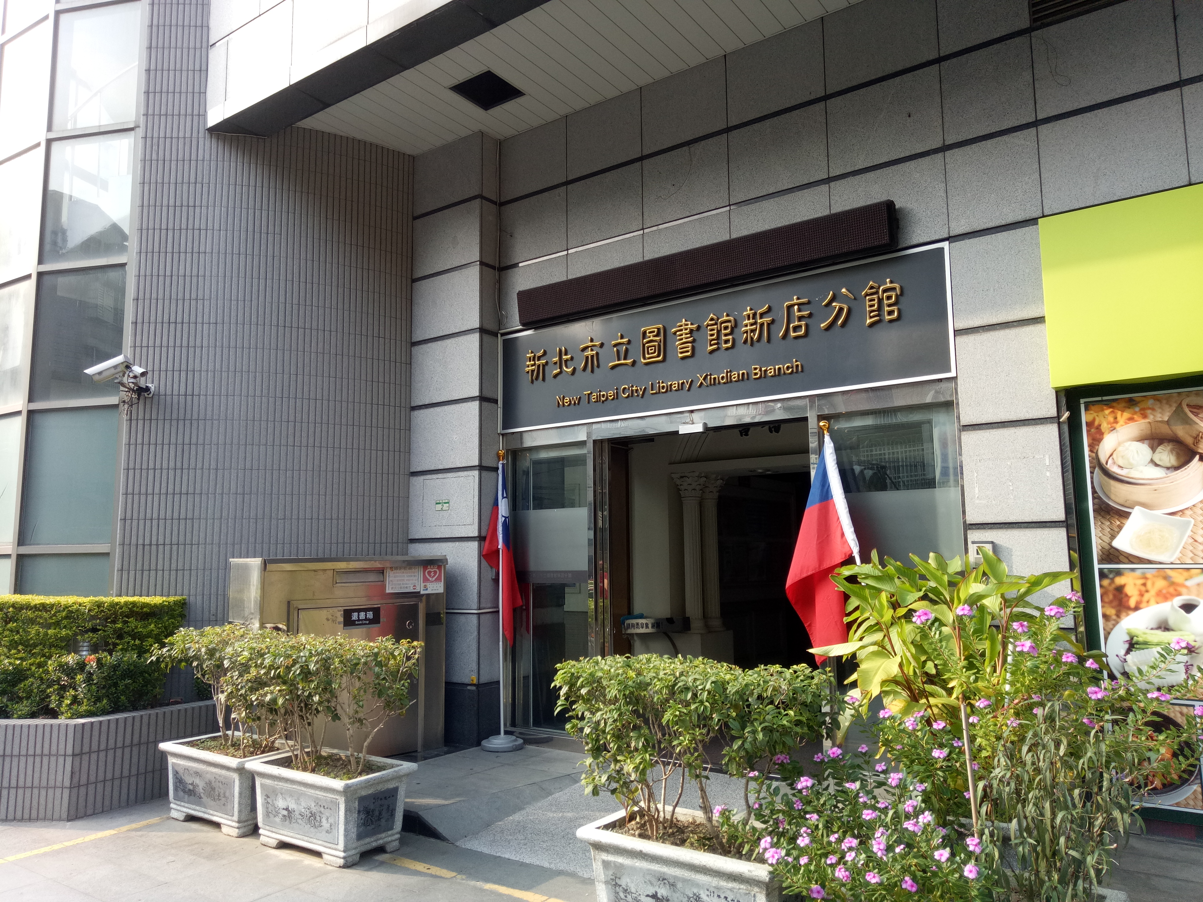 新北市立圖書館新店分館。